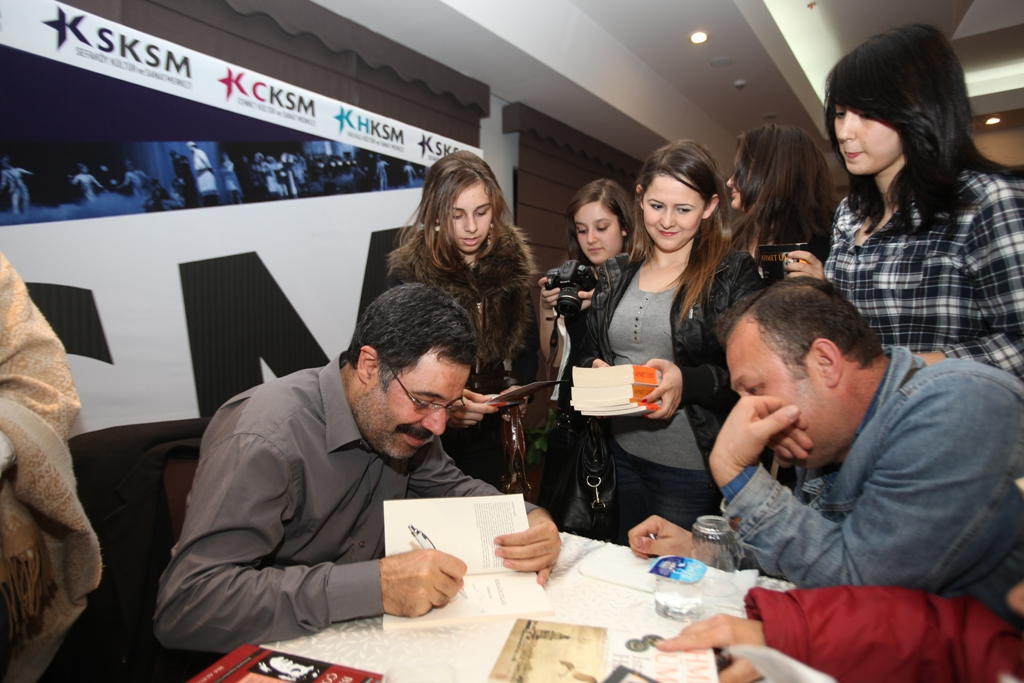 Yazar Ahmet Ümit (7)